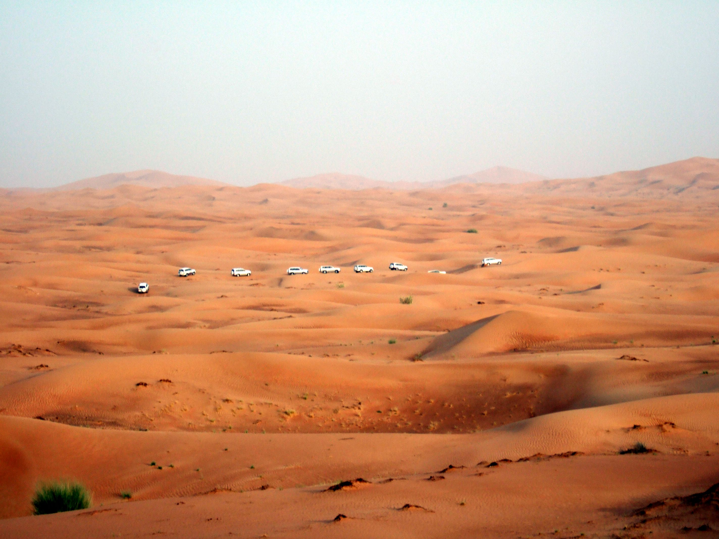 An organised dune-bashing safari in Dubai.